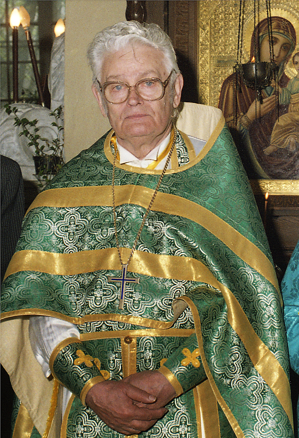 Emmanuel Kirss, õigeusu vaimulik ja ülempreester 1996